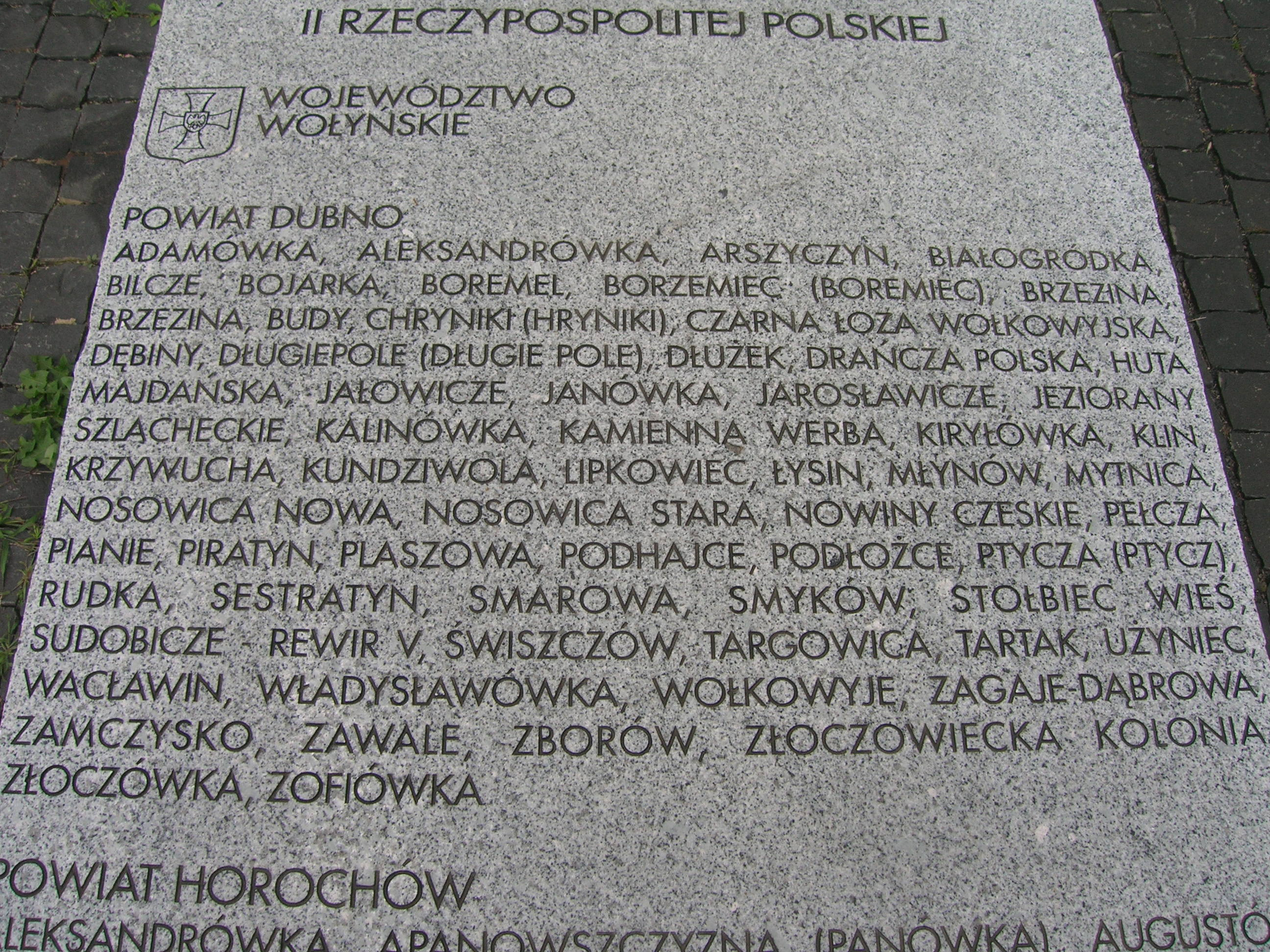 tablica powiat Dubno